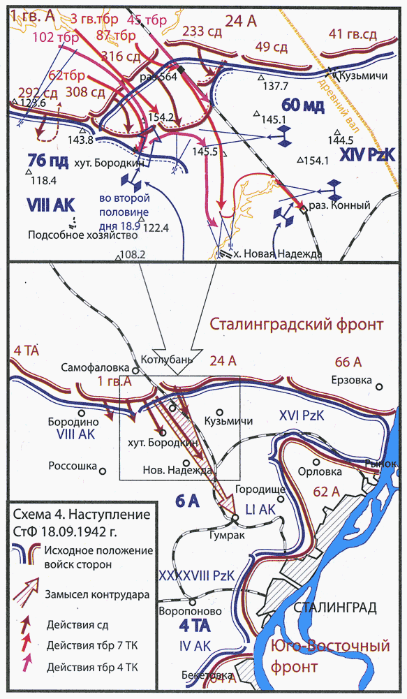 Схема из книги: Издание: Исаев А. В. Сталинград. За Волгой для нас земли нет. — М.: Яуза, Эксмо, 2008.